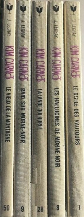 Quelques volumes de Kim Carnot (Pocket Marabout).